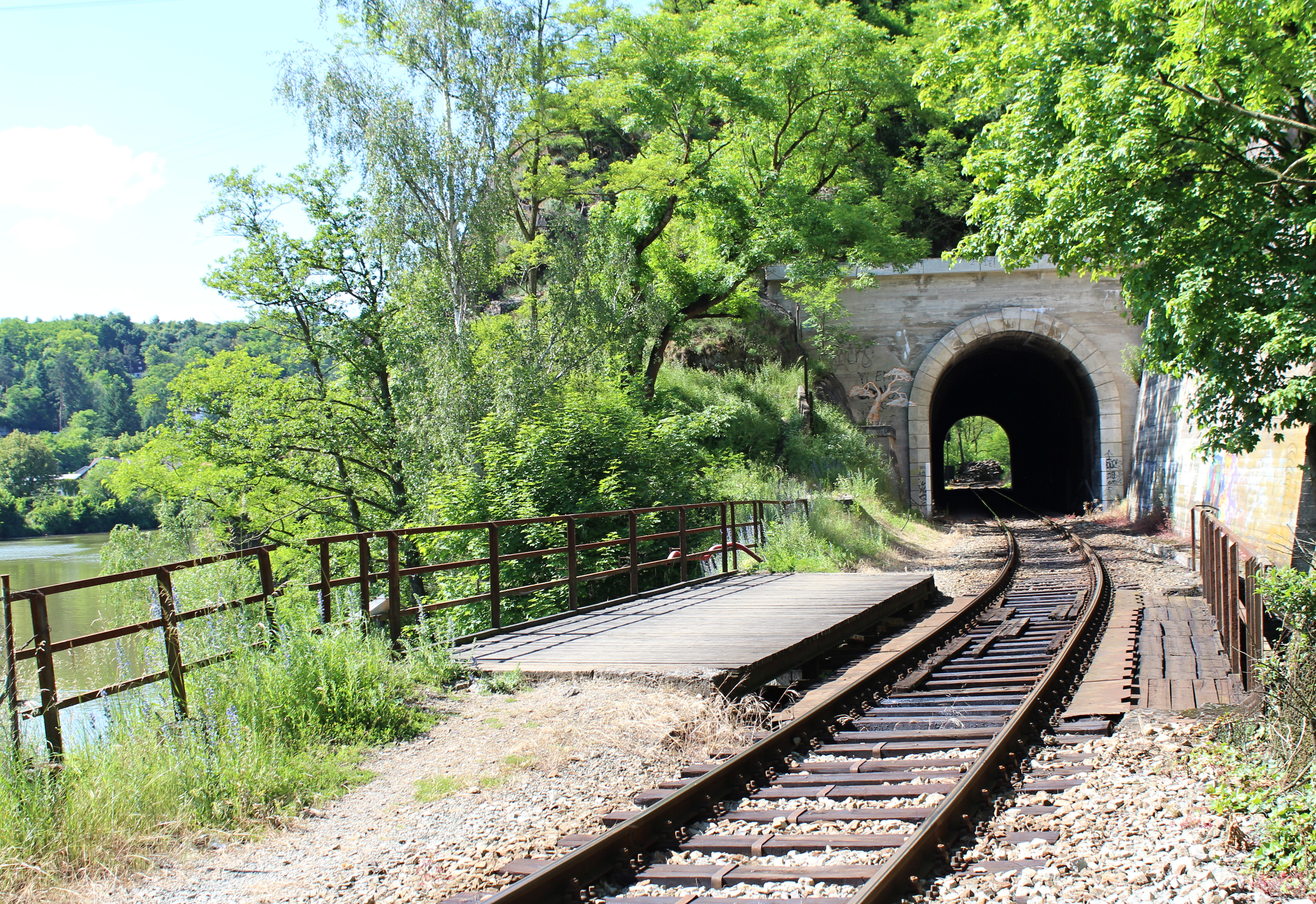 Libřický tunel z bývalé zastávky ČSD. Před tunelem je železniční most přes ústí Zahořanského potoka do Vltavy. Pohled na severozápad